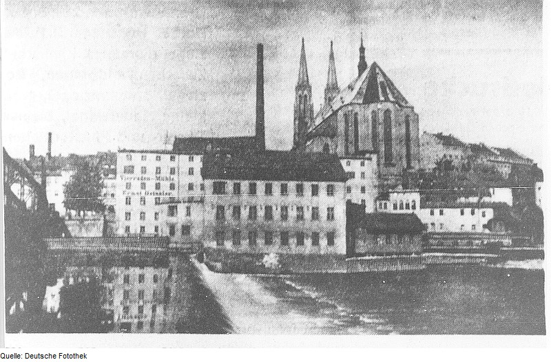 Original image description from the Deutsche Fotothek Görlitz. Vierradenmühle vor dem Abbruch 1928, aus: Neuer Görlitzer Anzeiger vom 19.5.1934